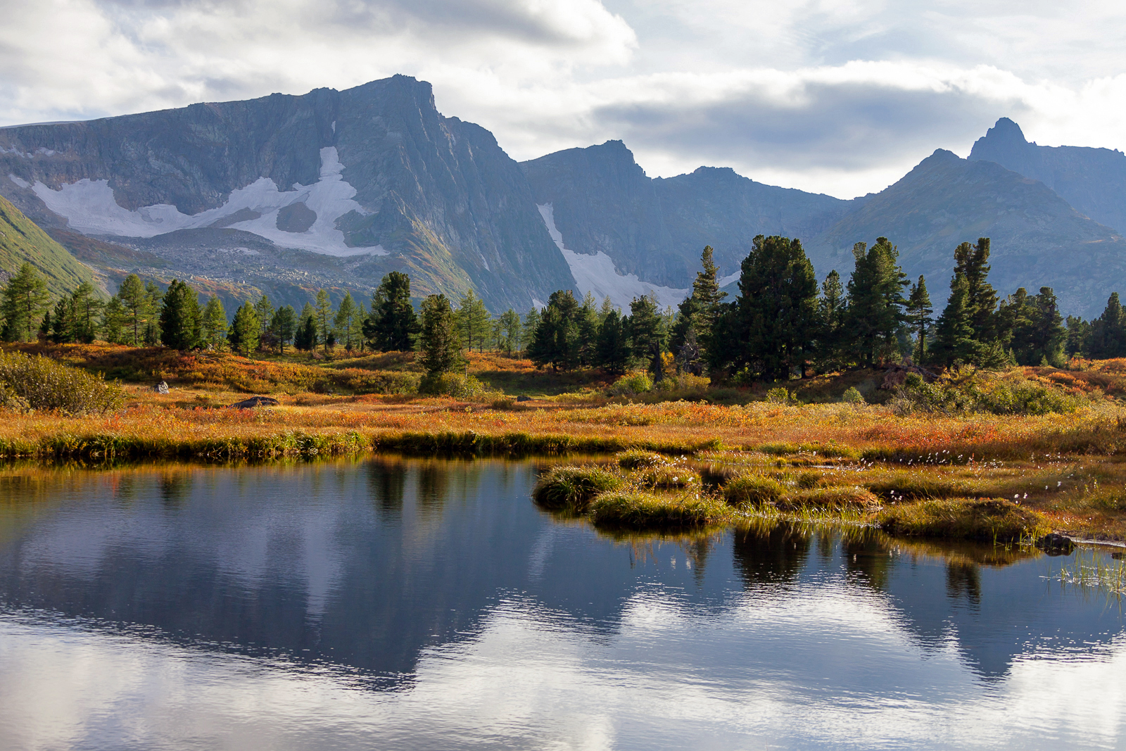 Золотая долина, Усть-Абаканский район This image is related to the protected area of Russia number 1910083